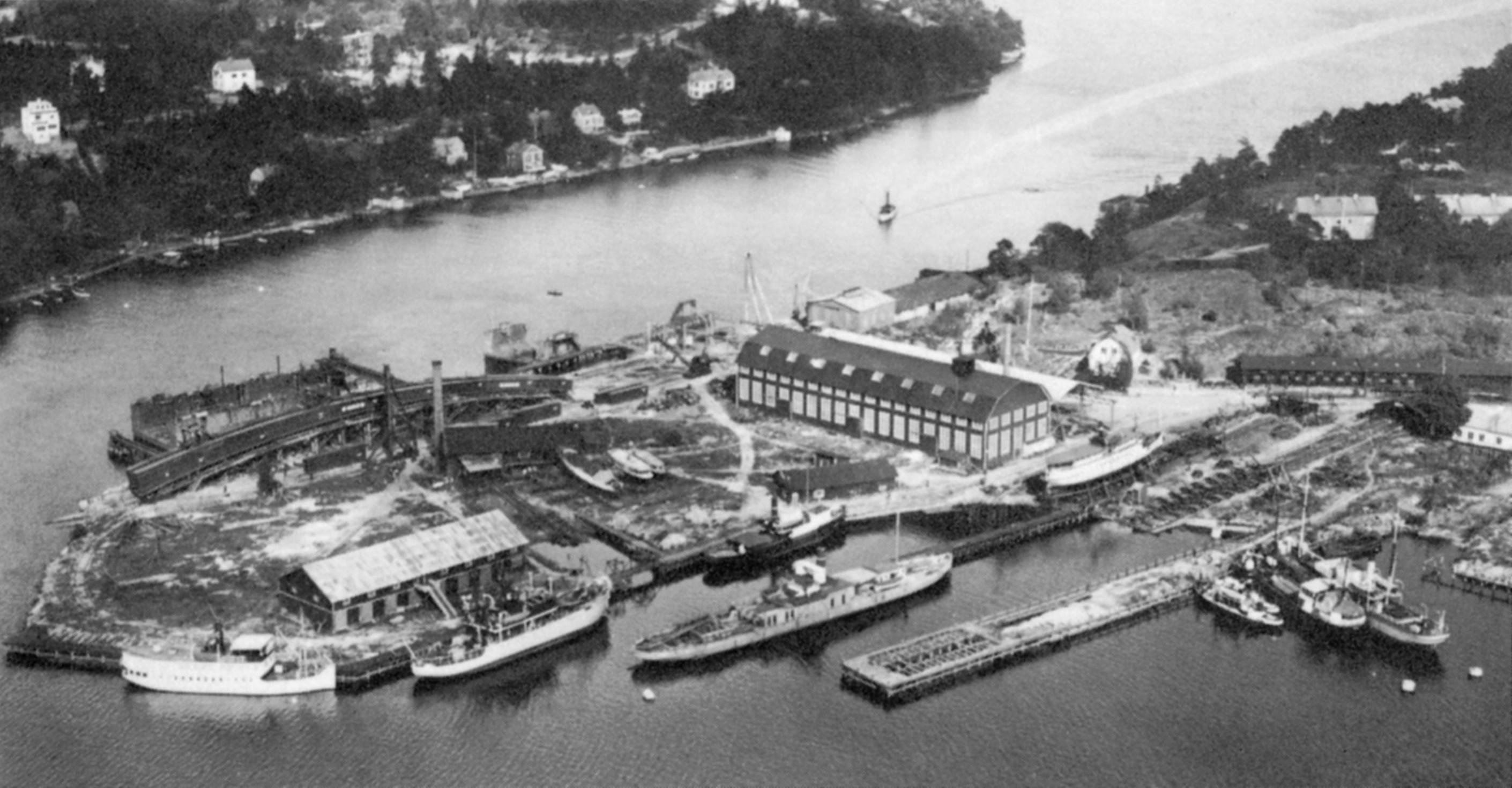 Ekenbergs varv med två av Västerbrons bågspann på stapelbädden.